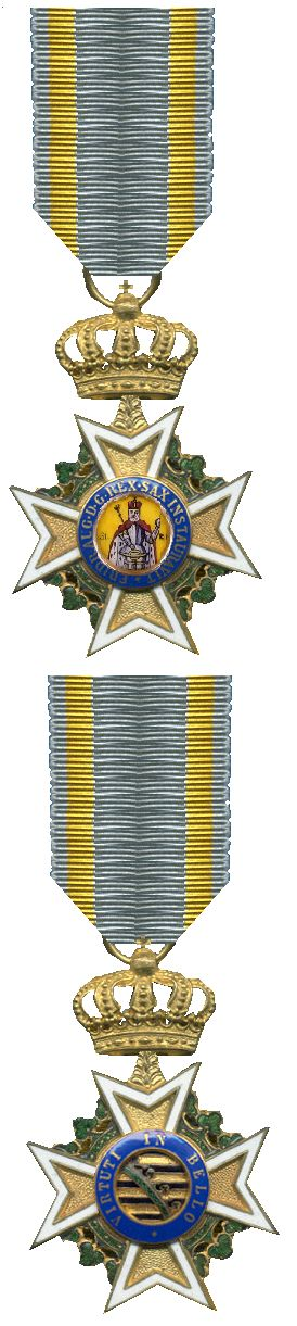 Kgl. Sächsischen Militär St.Heinrich Ordens